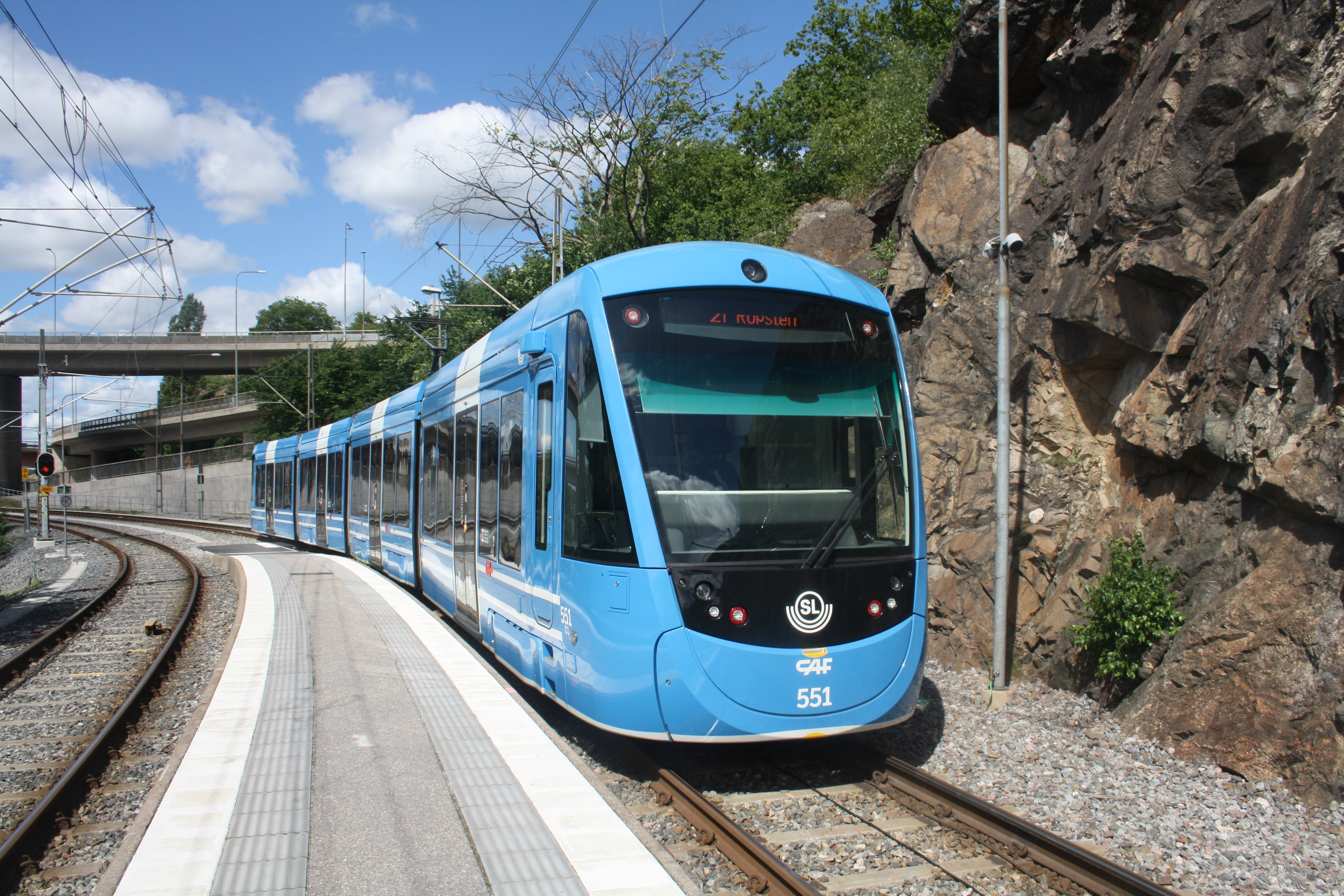 Lidingöbana, A36 lämnar Torsvik